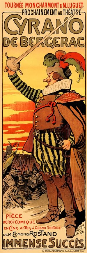 Cyrano de Bergerac pièce héroï-comique en cinq actes à grand spectacle de Edmond Rostand. Tournée Moncharmont et M. Luguet. Affiche : Lucien Métivet, 1898, imprimeur Verneau